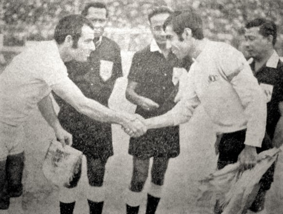 کاپیتان‌های دو تیم تاج ایران و هاپوئل اسرائیل در دیدار فینال مسابقات باشگاهی آسیا ۱۹۷۰